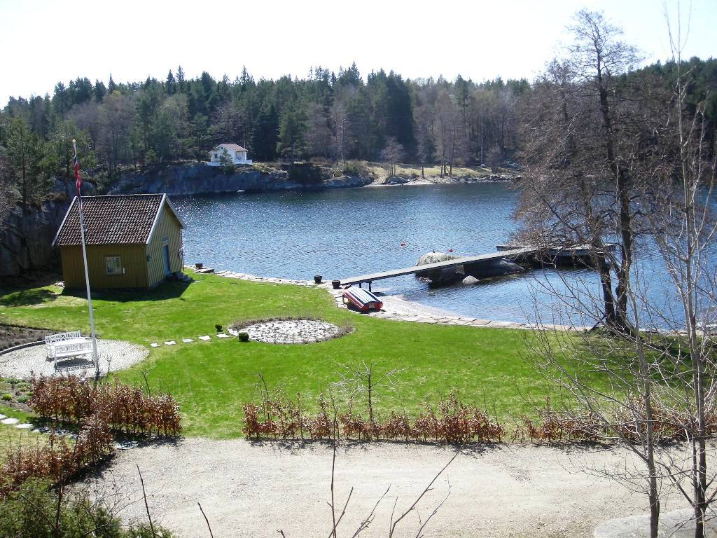 Høvåg i Lillesand kommune